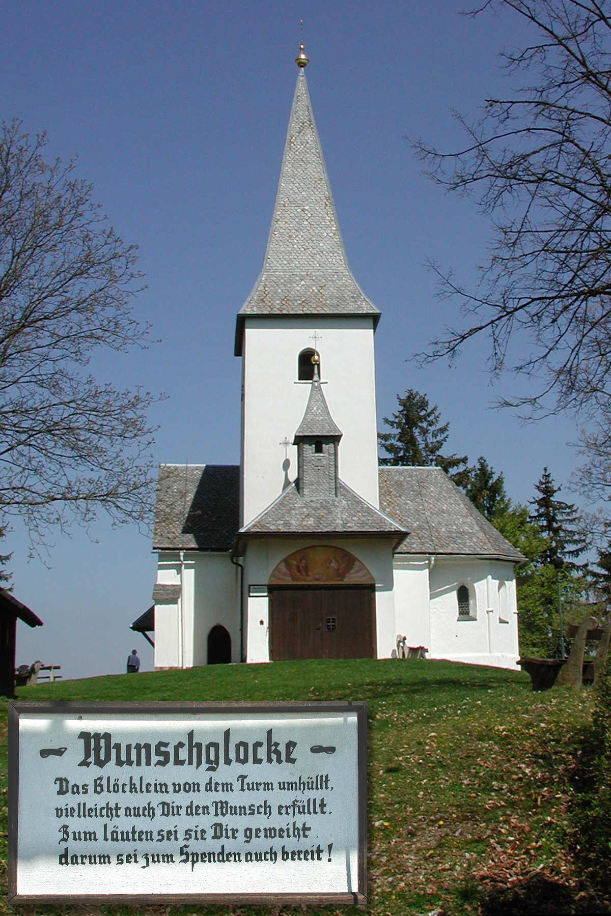 Georgikirchlein am Georgiberg südöstlich des Klopeiner See in Kärnten